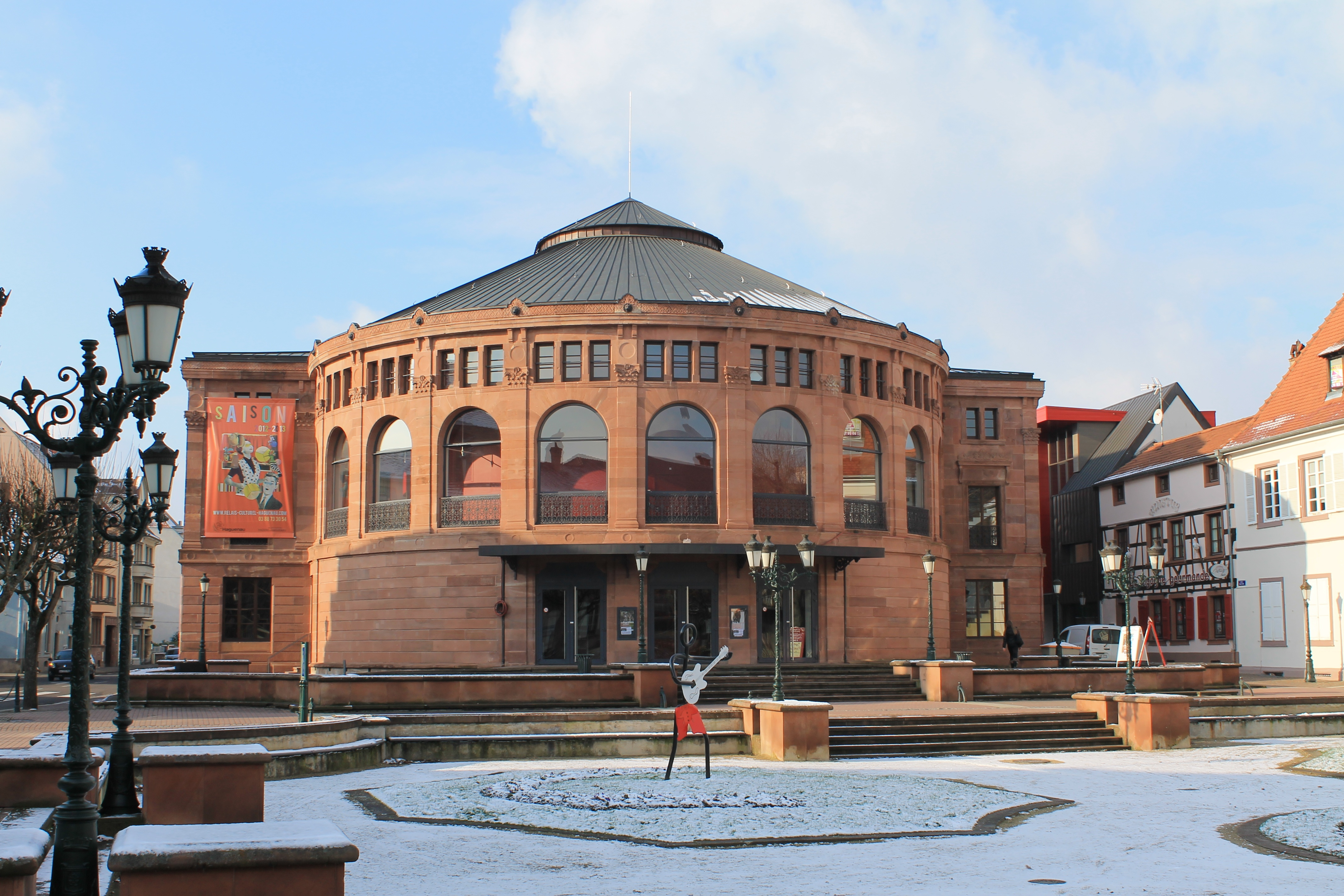 Haguenau